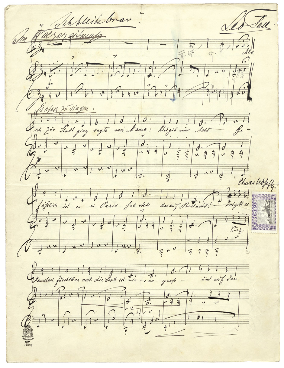 Leo Fall, Seite aus einem eigenhändigen Musikmanuskript "Ich bleibe brav. - Im Walzerzeitmaß. - Einfach zu singen."